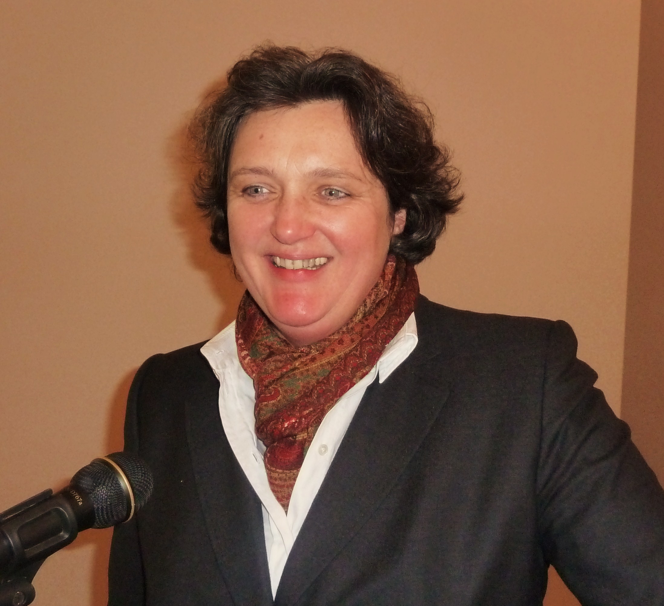 Prof. Dr. Friederike zu Sayn-Wittgenstein während eines Vortrags zum Versorgungskonzept Hebammenkreißsaal im Haus der Wissenschaft in Bremen